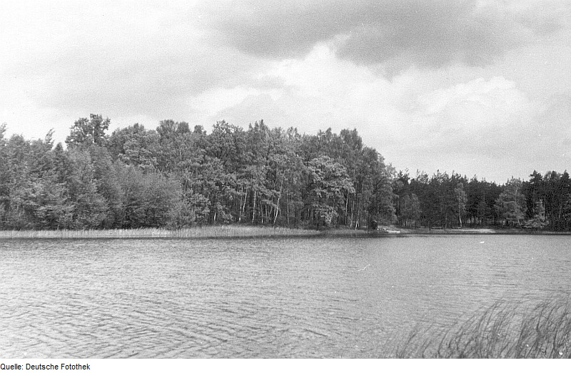 Original image description from the Deutsche Fotothek Schönteichen-Biehla. An den Mühlenteichen